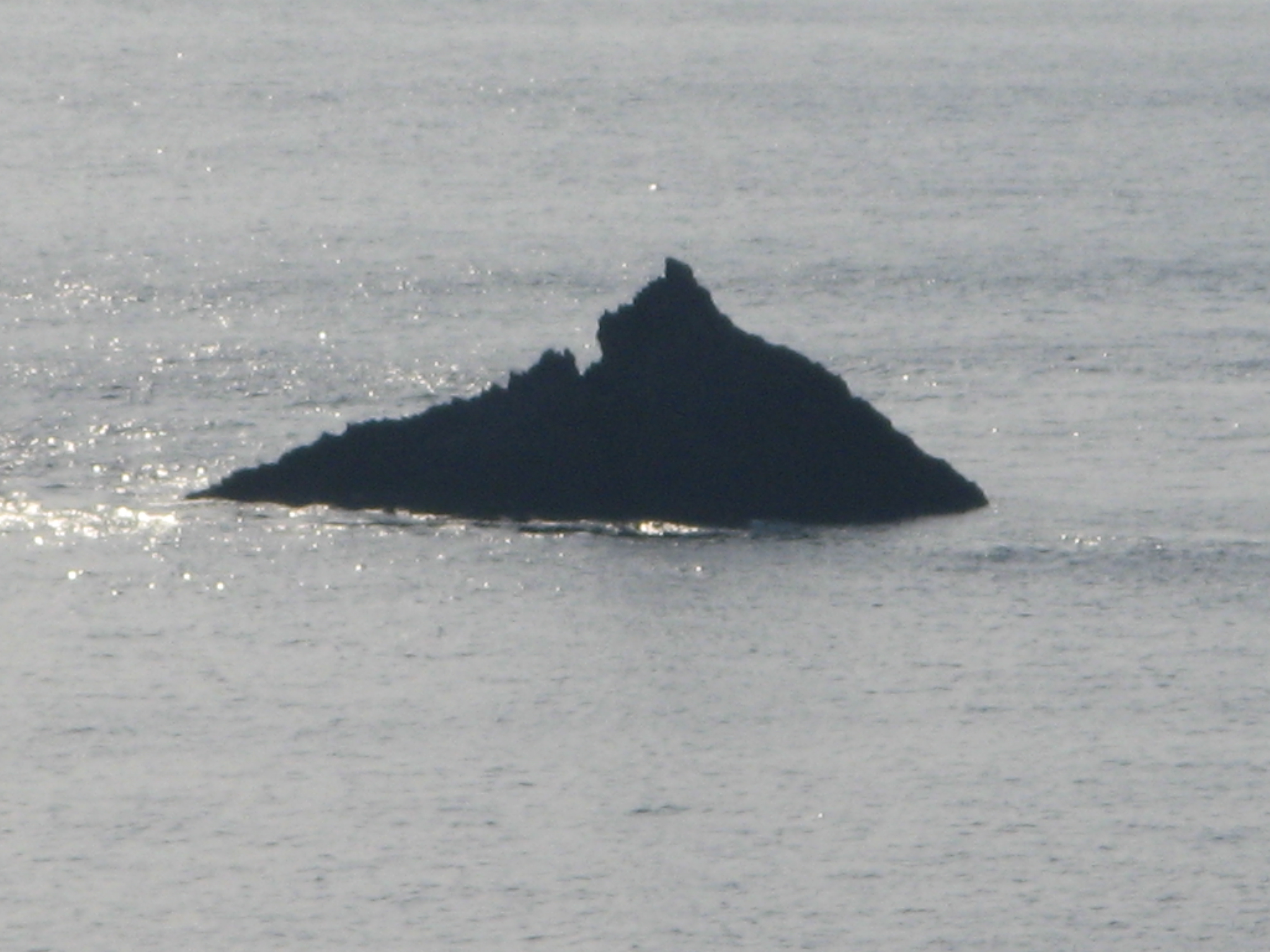 Isola del Corno (Sardegna, Italy)